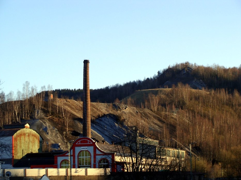 Ehemalige Charlottenhütte und Sandhalde in Niederschelderhütte.